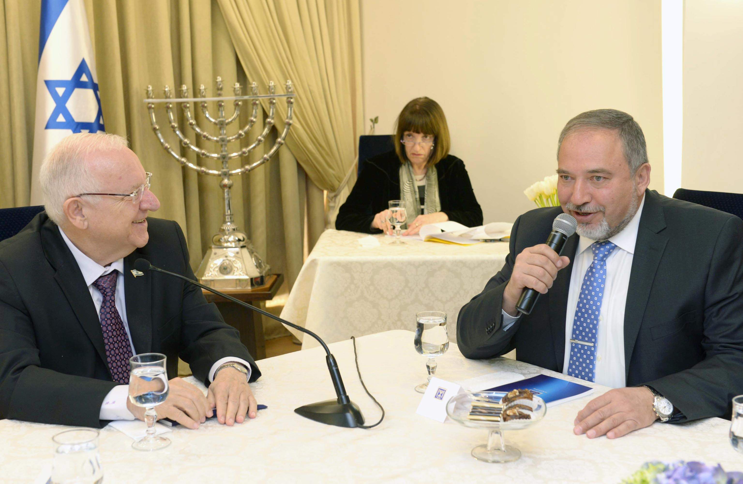 נשיא מדינת ישראל ראובן ריבלין פותח בהתייעצויות עם המפלגות השונות לקראת הרכבת הממשלה לאחר בחירות מרץ 2015 עם ישראל ביתנו